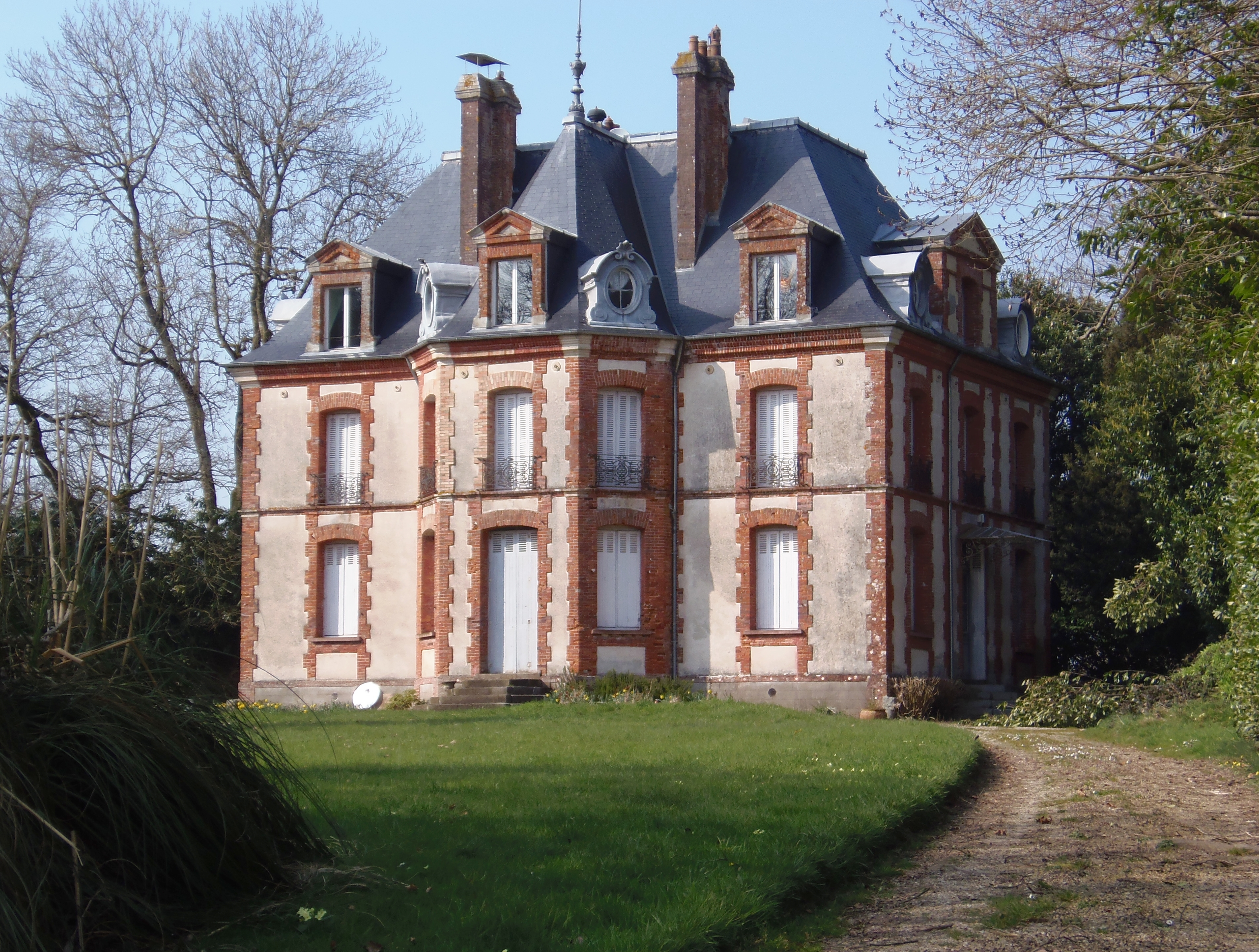 La Bazoque (Normandie, France). Le château de la Carrière.